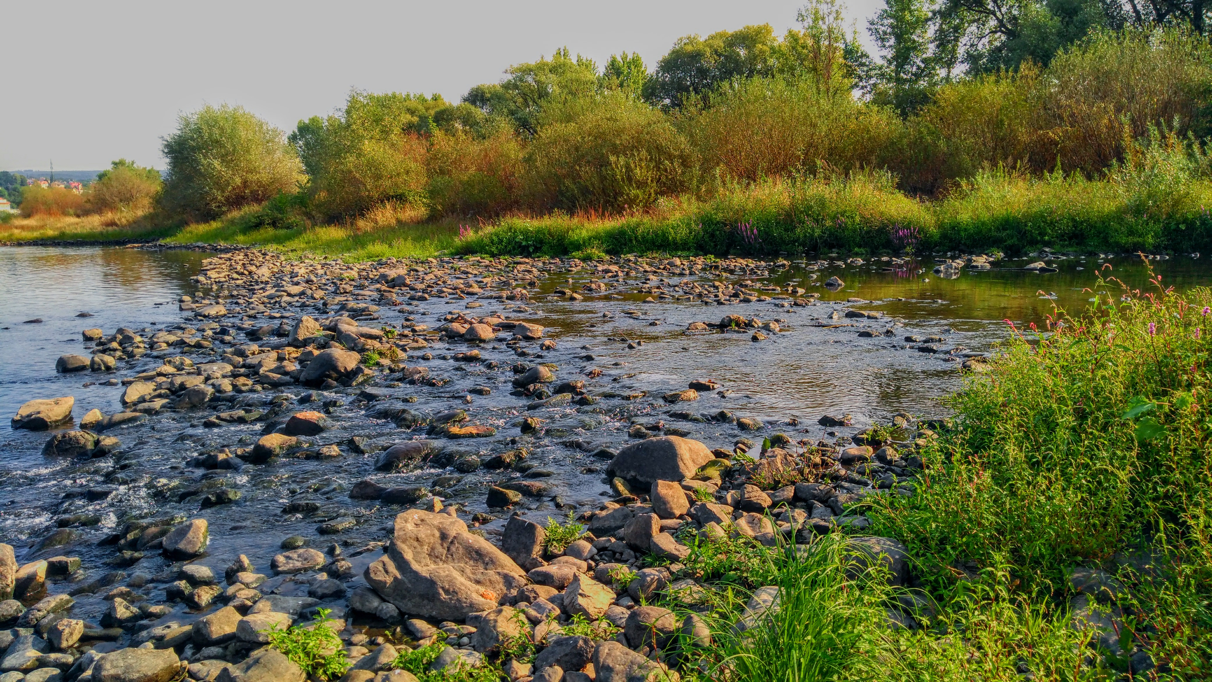 Vtok do Labe.